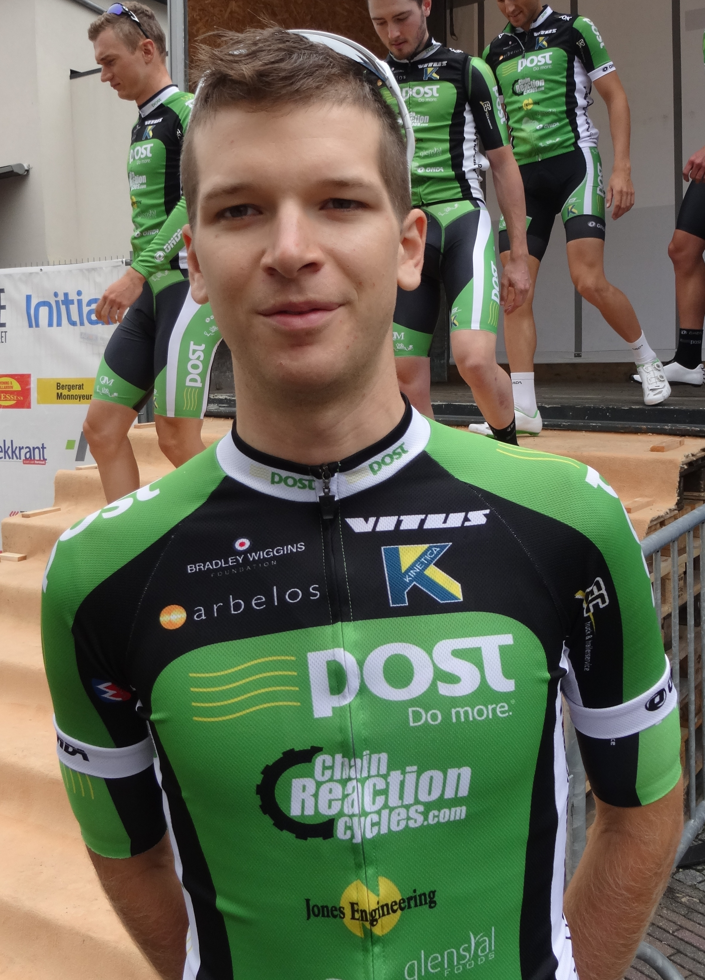 Reportage photographique réalisé le mercredi 27 août à l'occasion du départ de la Druivenkoers Overijse 2014 à Huldenberg, Belgique.